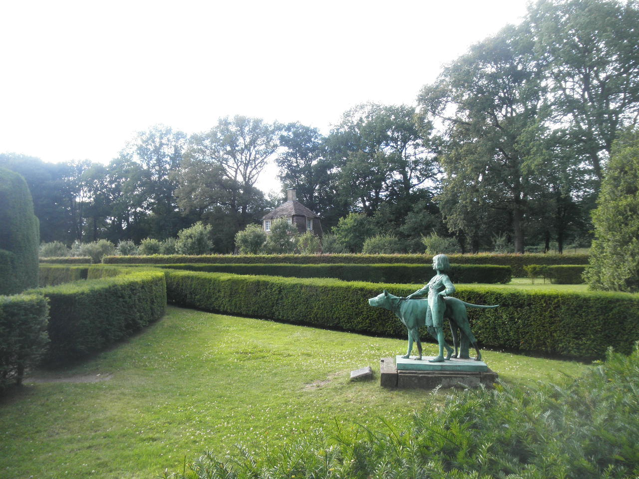 Schloss Clemenswerth in Sögel, Ziergarten